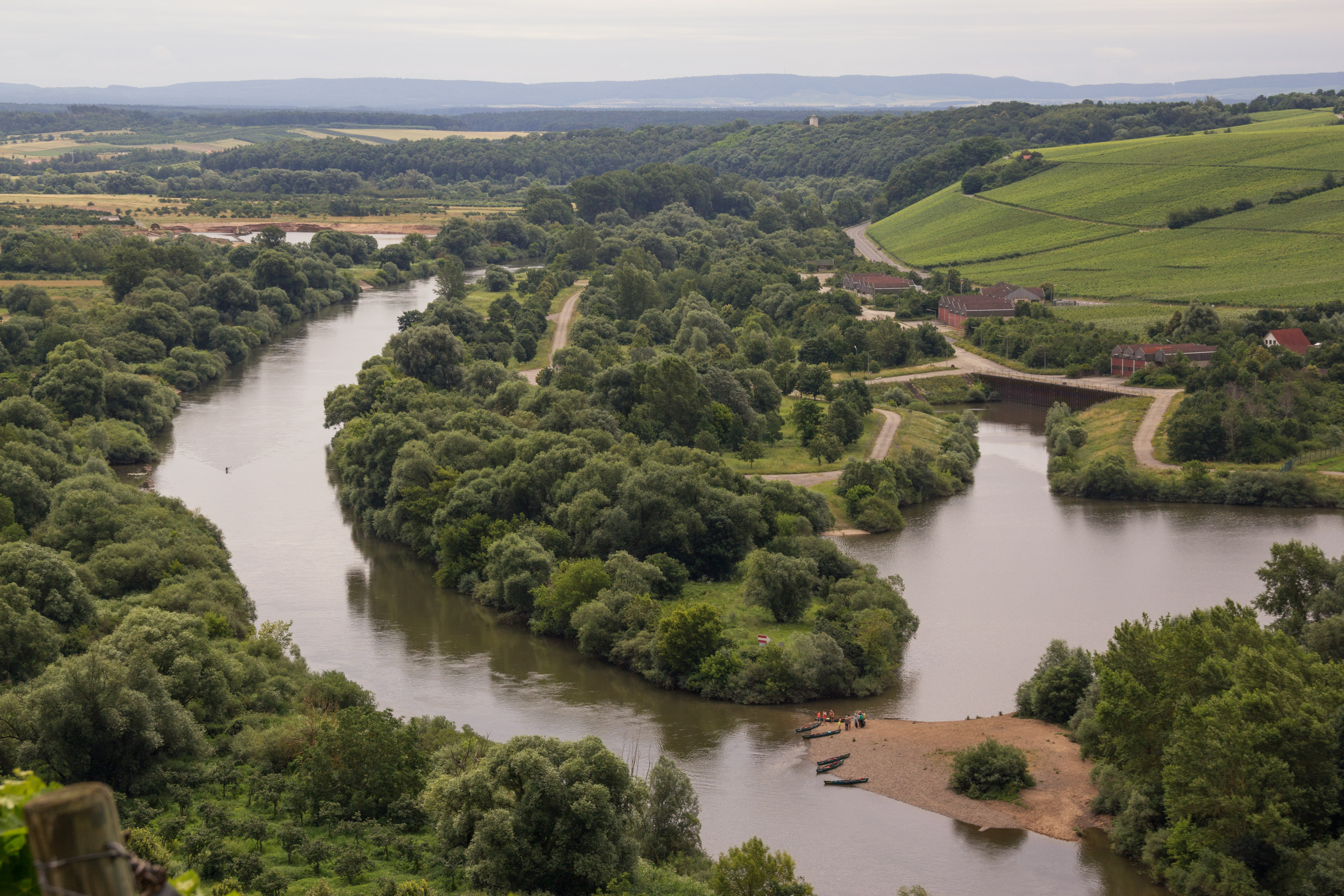 NSG Alter Main, Nordheim am Main